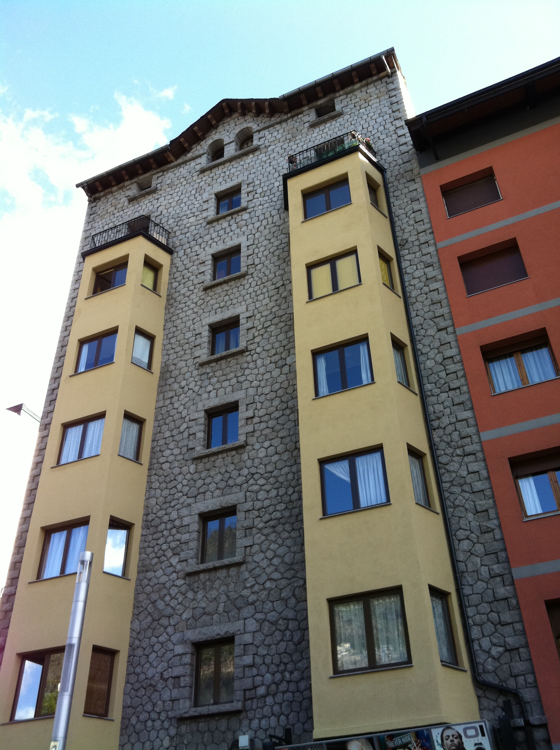 Casa Palmitjavila